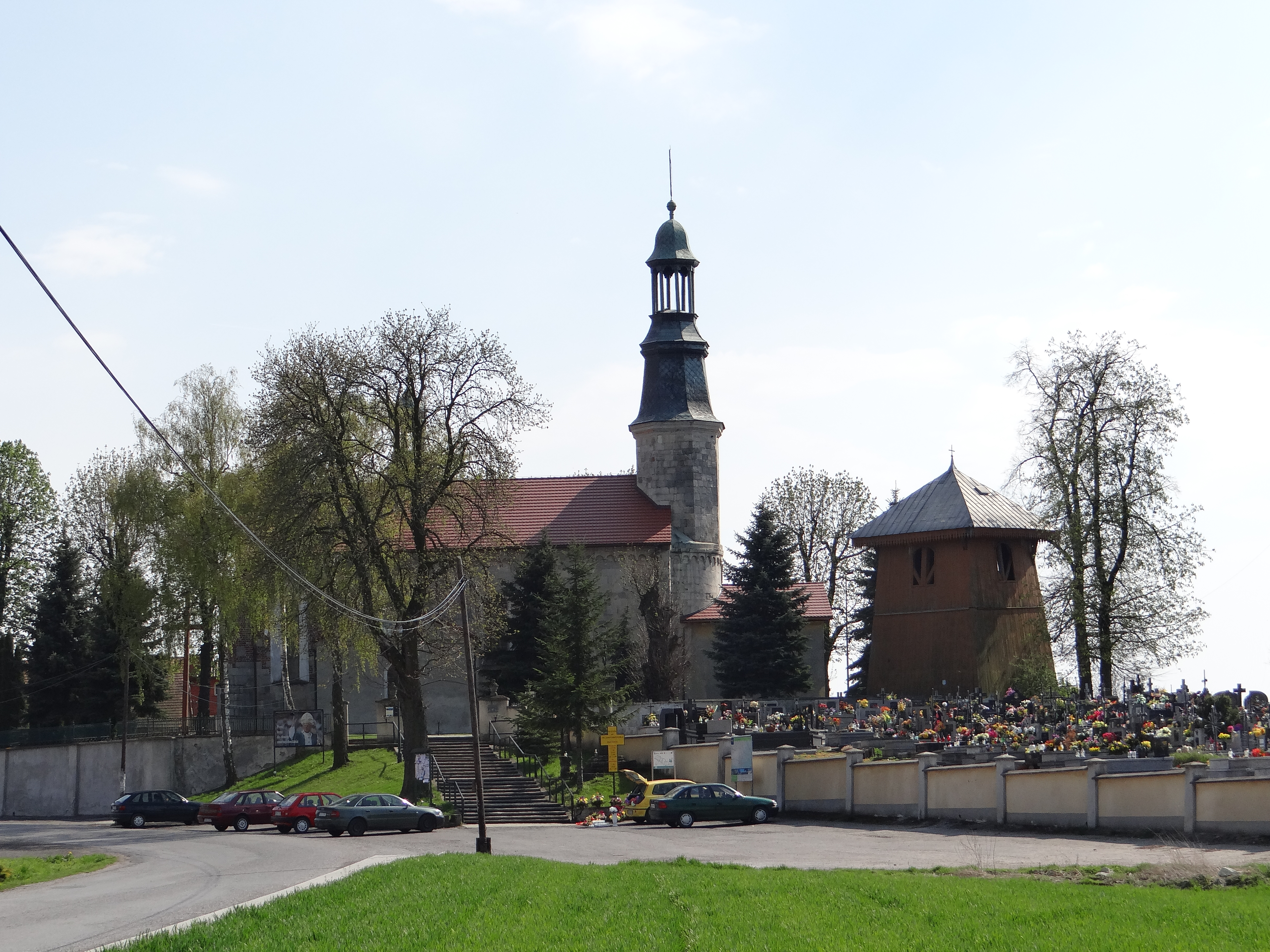 Prandocin, zespół kościoła par. pw. św. Jana Chrzciciela, XII, XIX, XX